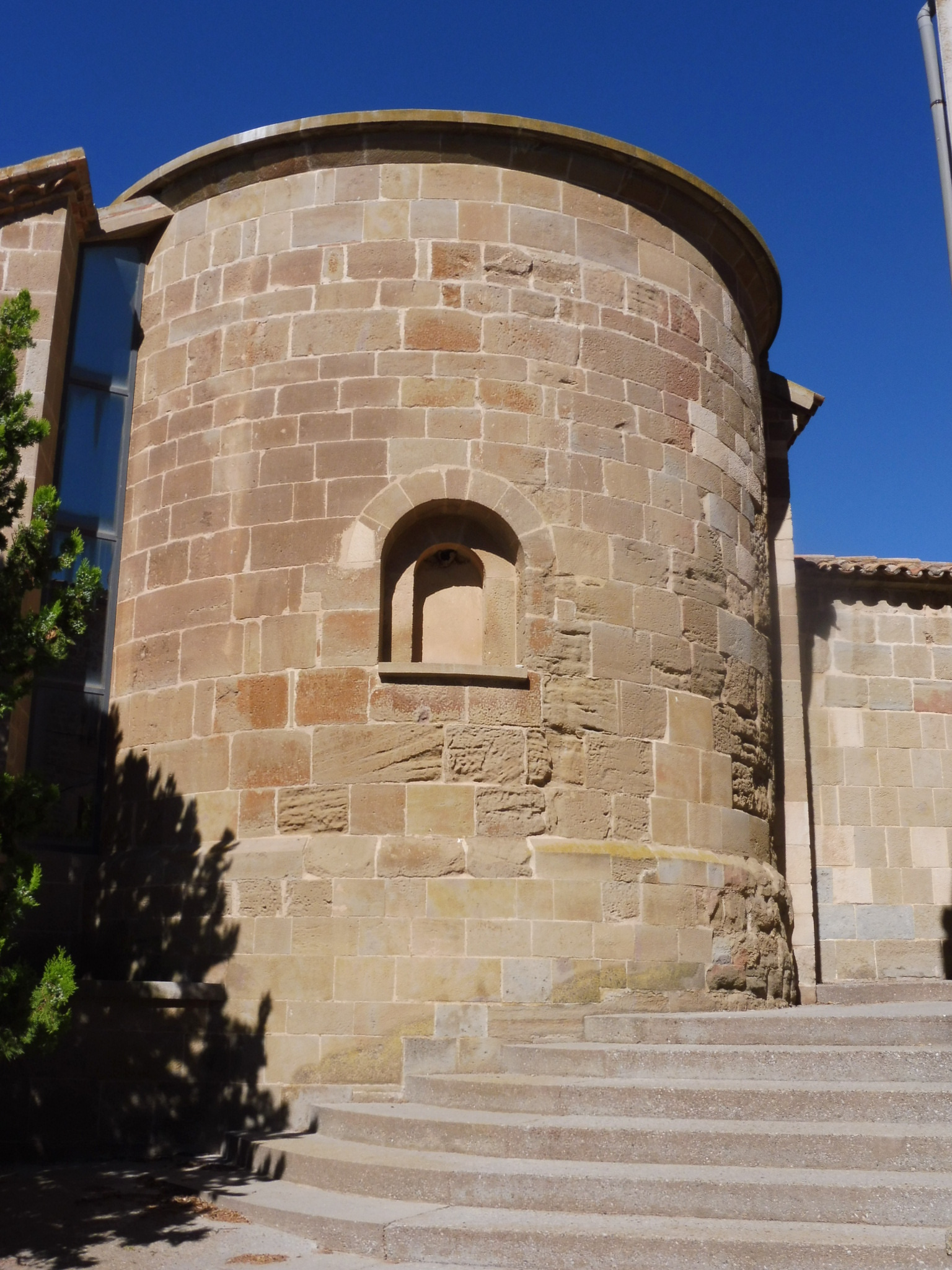 Església de la Mare de Déu del Remei (Ossó de Sió): absis